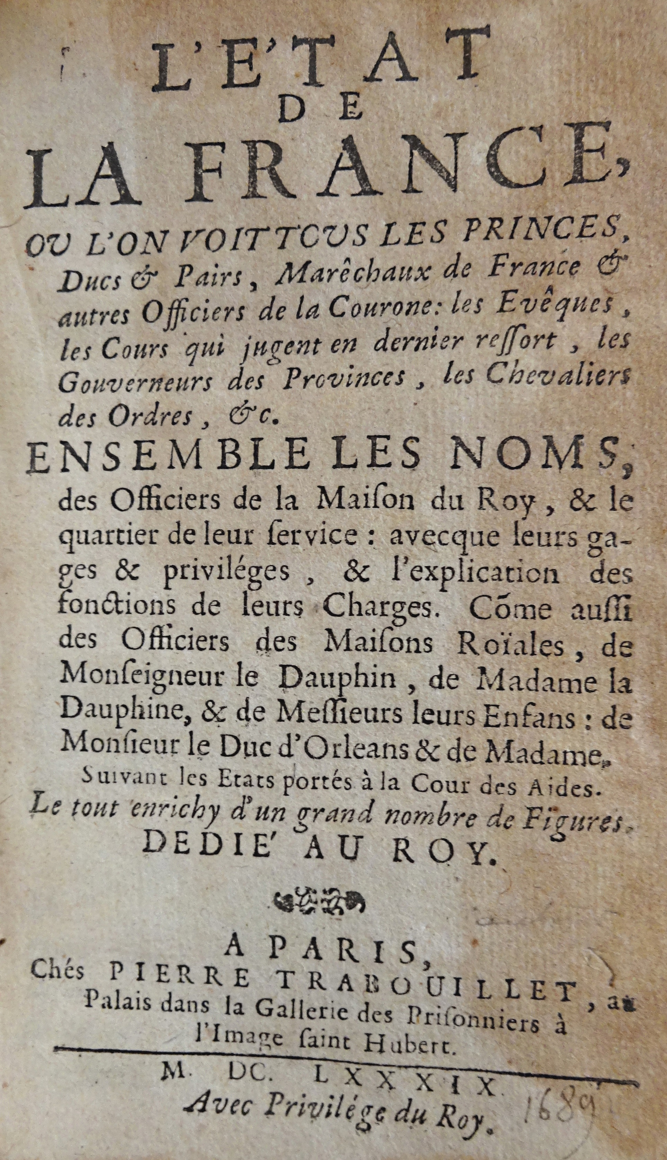 Annuaire administratif "Etat de la France" édité à Paris en 1689